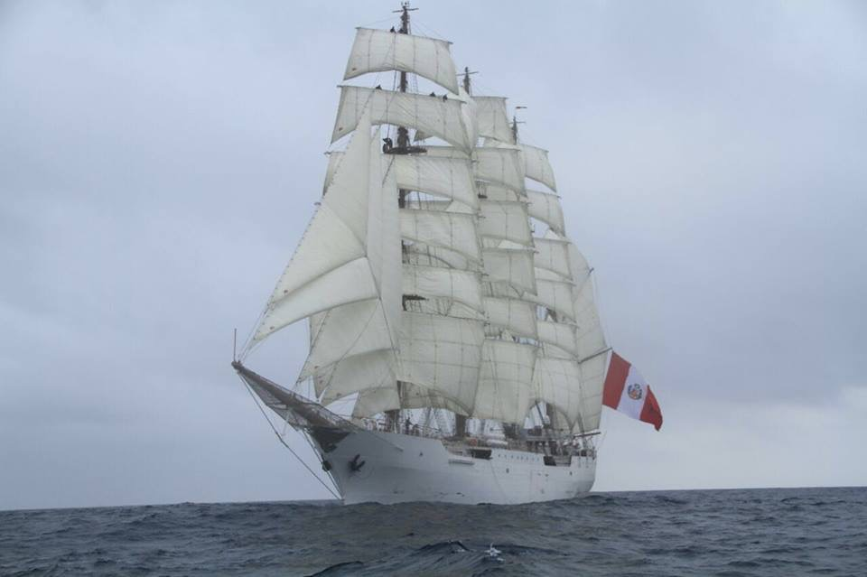 Buque Escuela